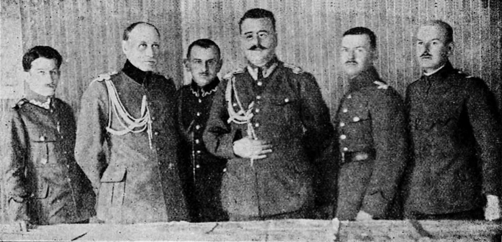 Sztab 1 Dywizji Litewsko-Białoruskiej z gen. Wacławem Iwaszkiewiczem-Rudoszańskim; 1919. Stoją (od lewej): por. Meyer, szef sztabu płk Edmund Kessler, kpt. Strzelczyk, dowódca gen. Wacław Iwaszkiewicz-Rudoszański, kpt. Wysocki, por. Imiela.